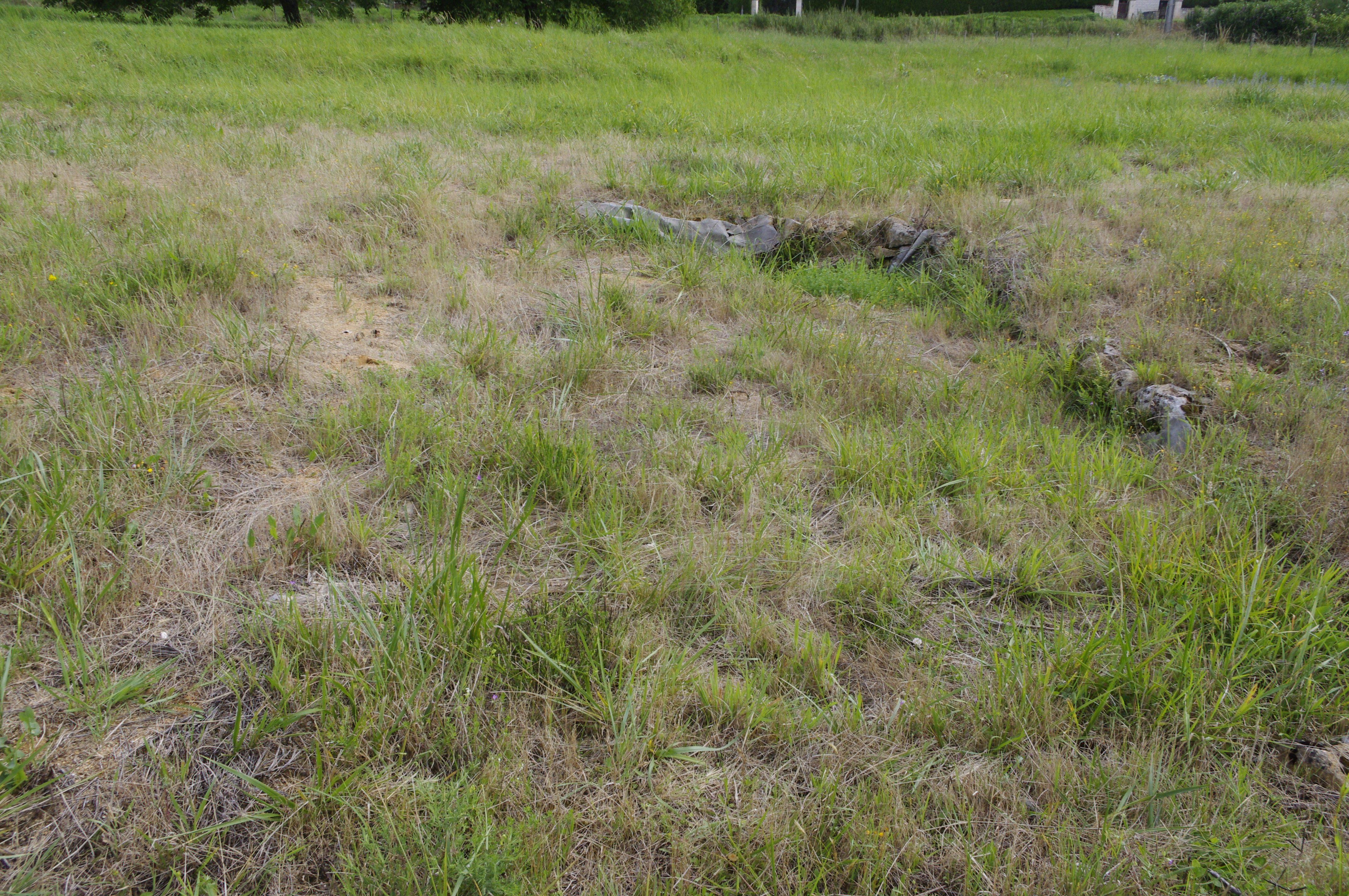 Vestiges de la villa gallo-romaine de Nontronneau. Après la campagne archéologique, le site a de nouveau été recouvert de sable ; quelques pierres dépassent juste du sol.